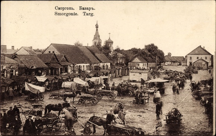 Беларуская (тарашкевіца): Смаргонь (Smarhoń), пляц Рынак (plac Rynak). Царква-мураўёўка